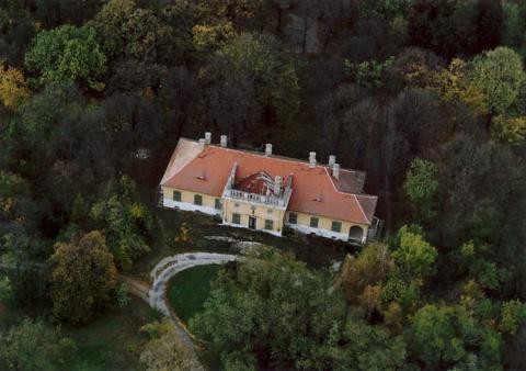 Pusztaszabolcs, Cikolai Mansion. Hungary, aerialphotography